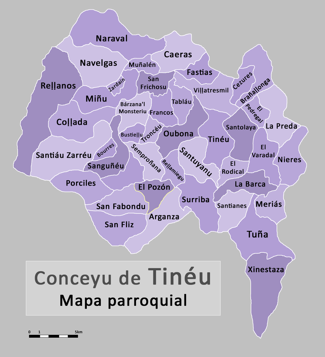 Mapa parroquial del conceyu de Tinéu